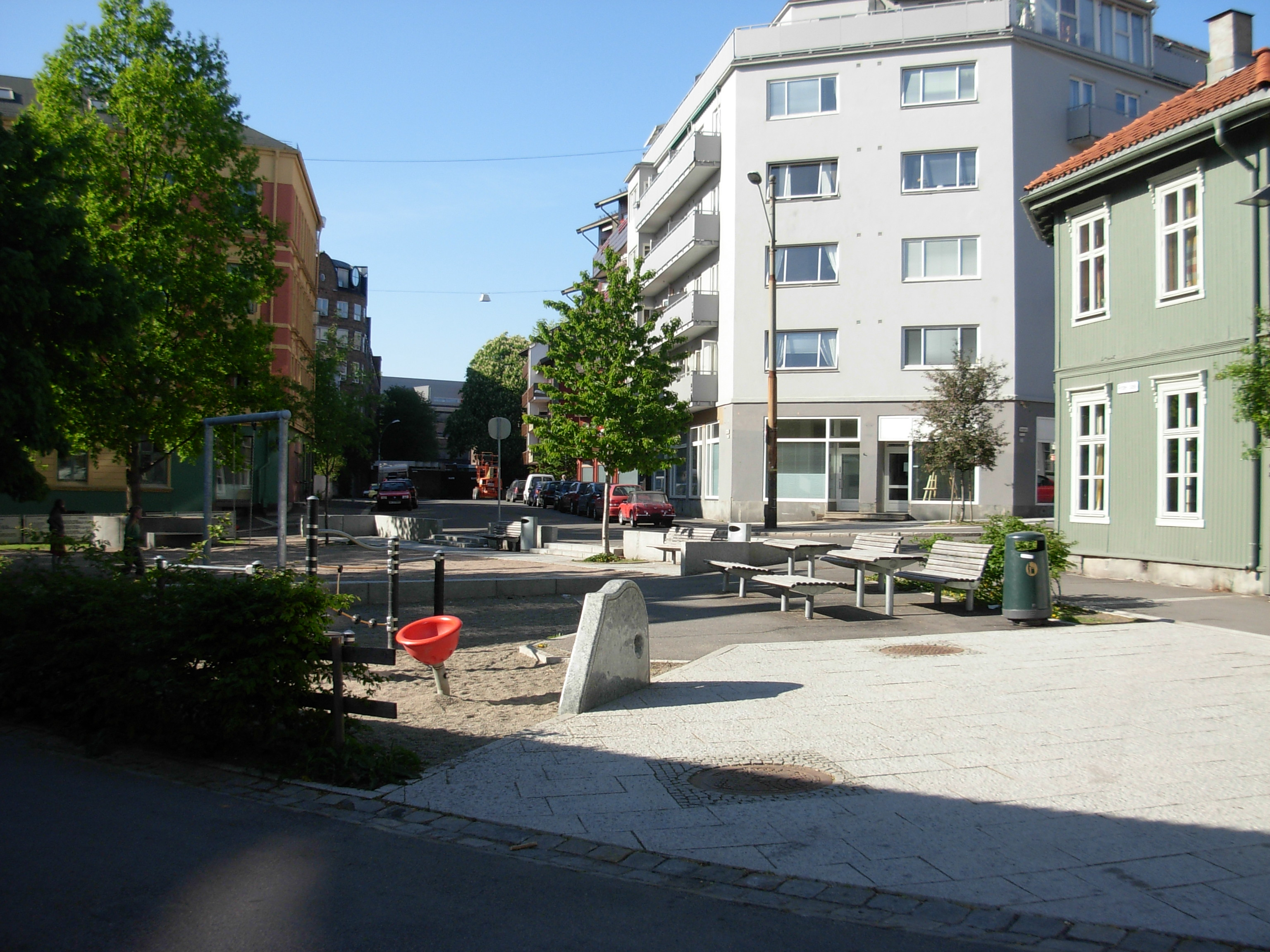 Rodes plass, Rodeløkka, Oslo